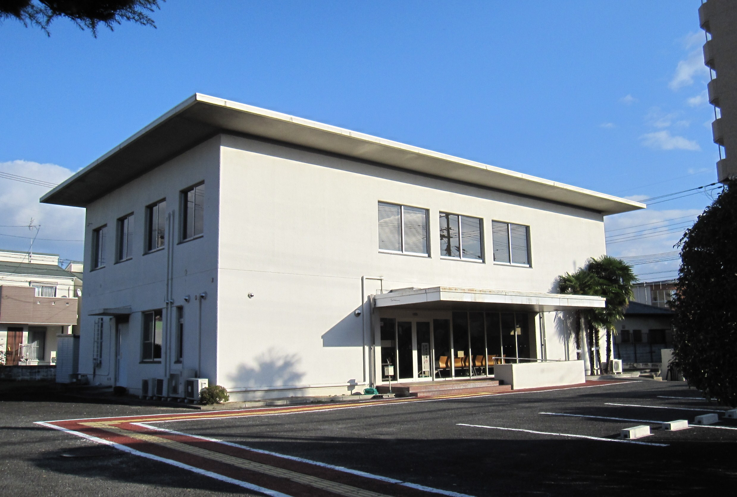 豊中簡易裁判所